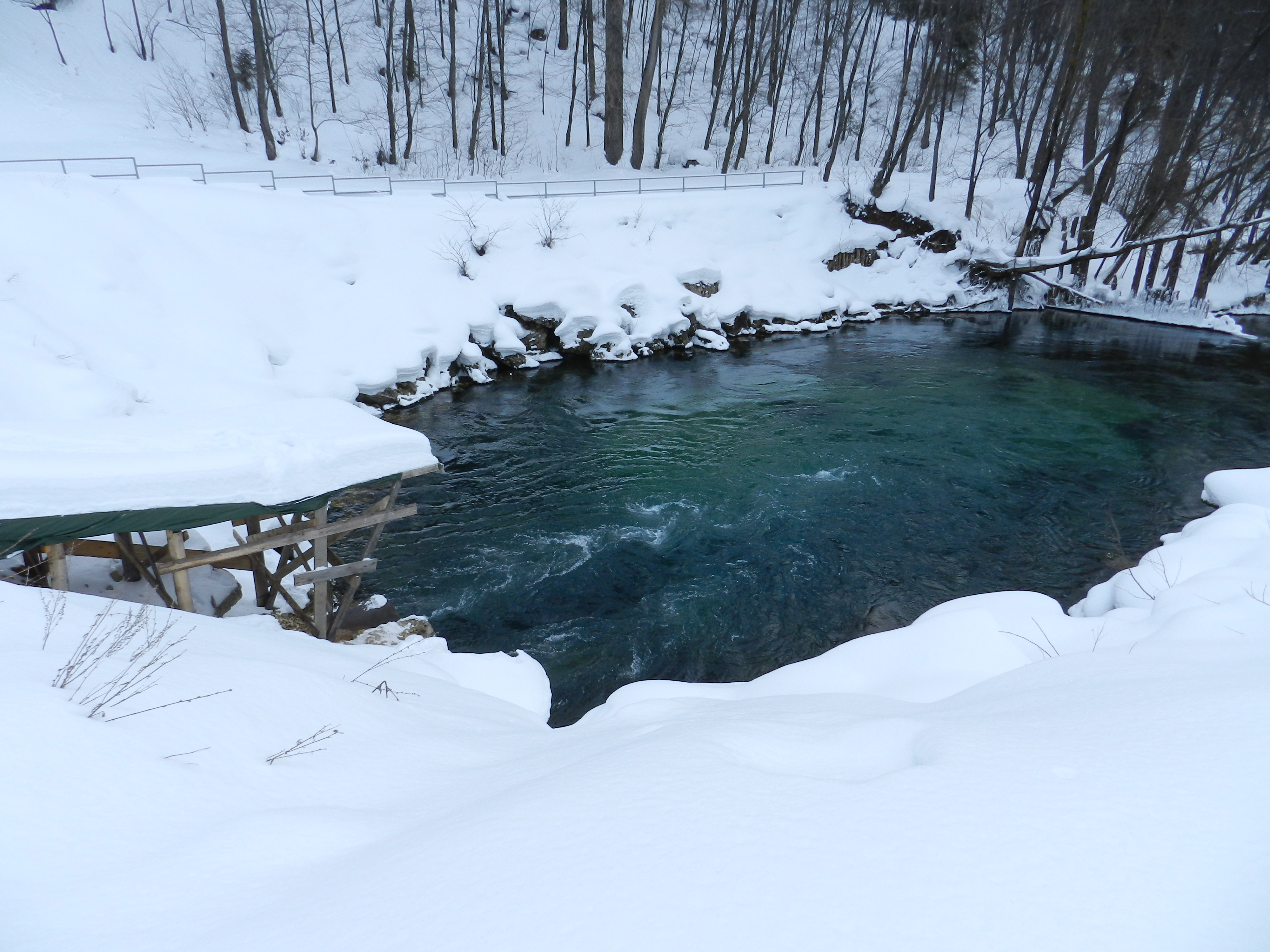 Источник "Красный Ключ", Нуримановский район This image is related to the protected area of Russia number 0210189